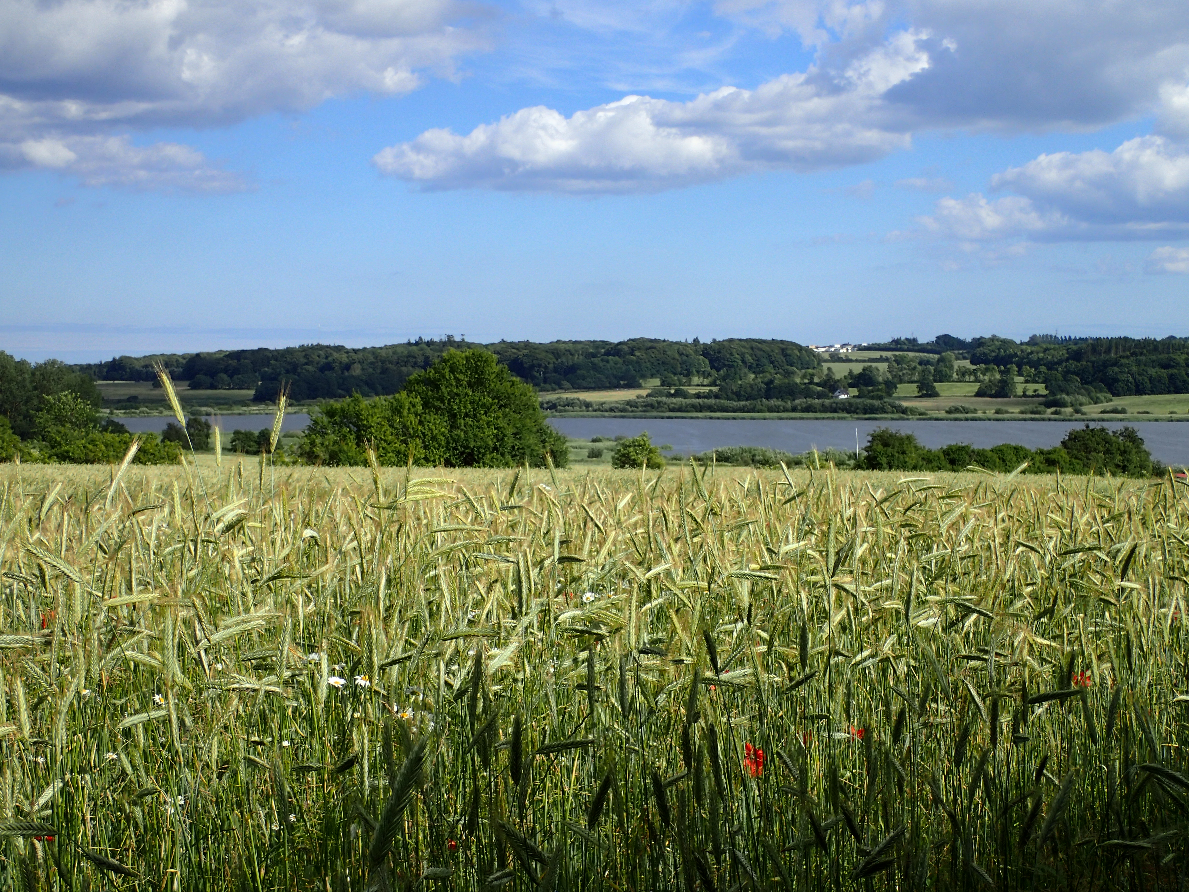 Kik sydøst over Årslev Engsø. Ved markerne syd for Årslev.